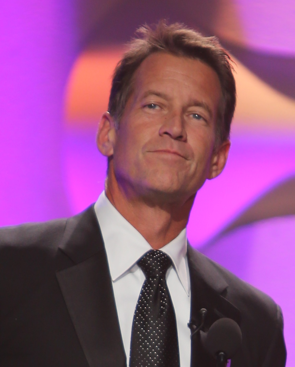 2014 AHA Hero Dog Awards Celebrity Hosts James Denton